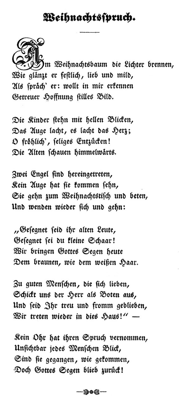 Hermann Kletke: Am Weihnachtsbaum die Lichter brennen (1841)